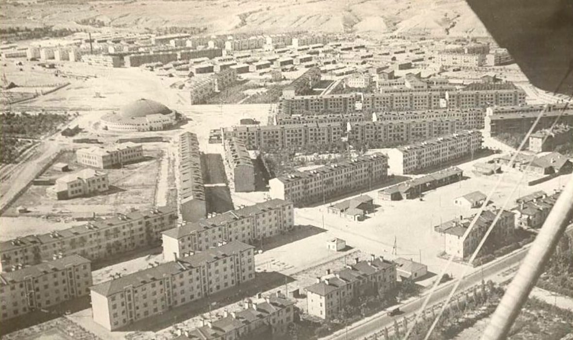 Тракторозаводский район Сталинграда 1930-е годы